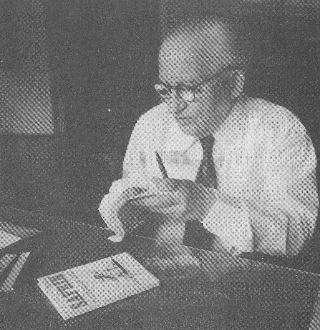 Horacy Safrin